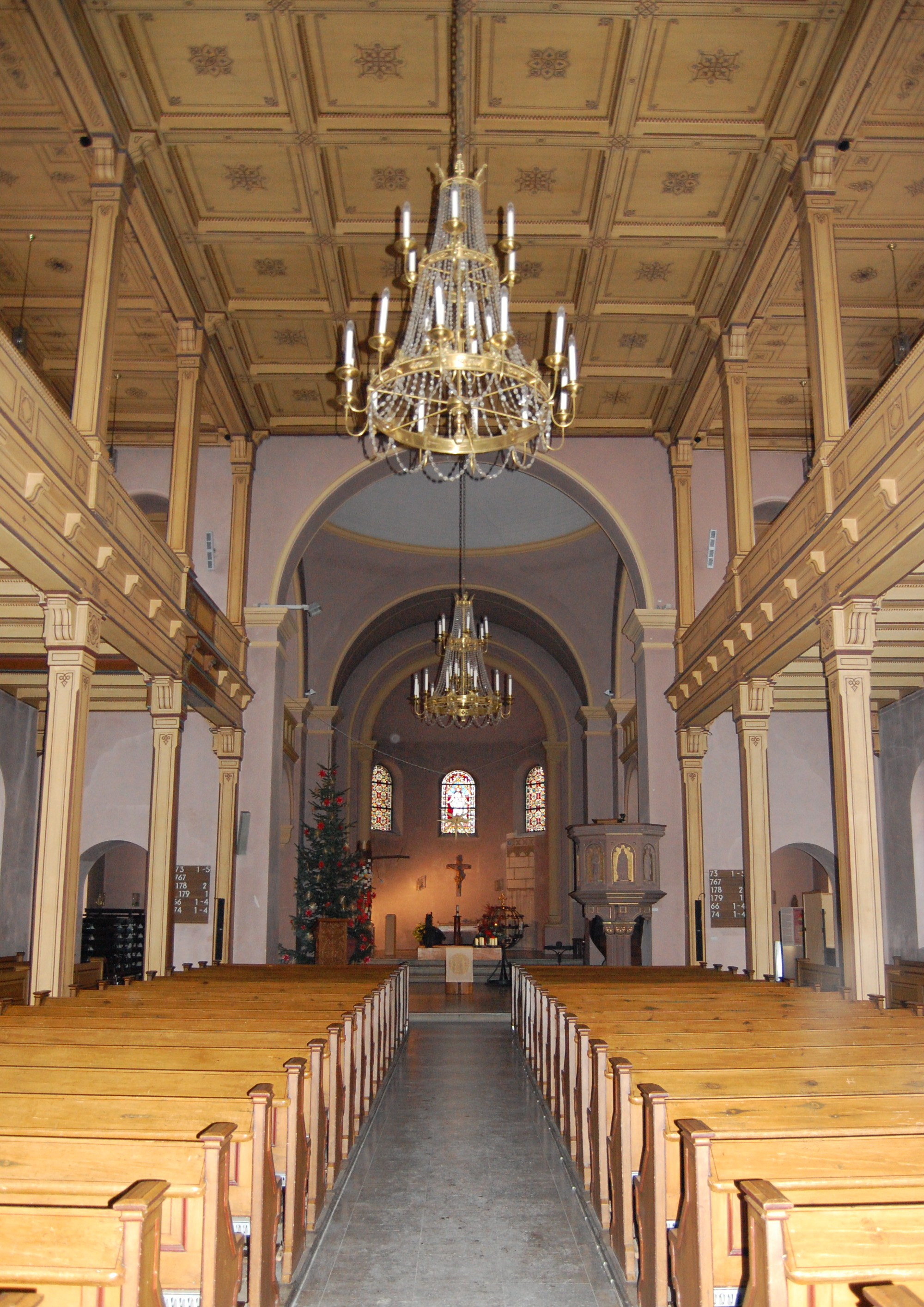 Protestantische Erlöserkirche in Bad Kissingen, Innenansicht